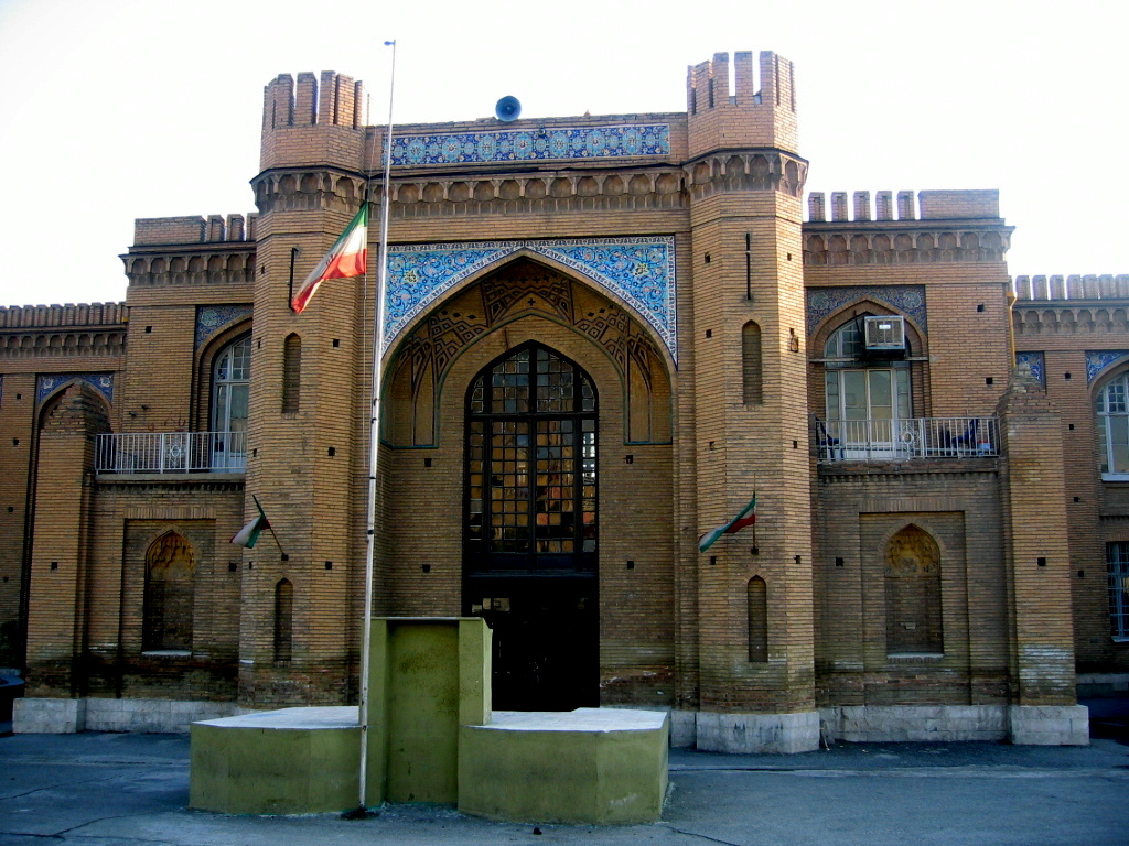 This picture was taken on an afternoon in Winter 2007, after school was closed.